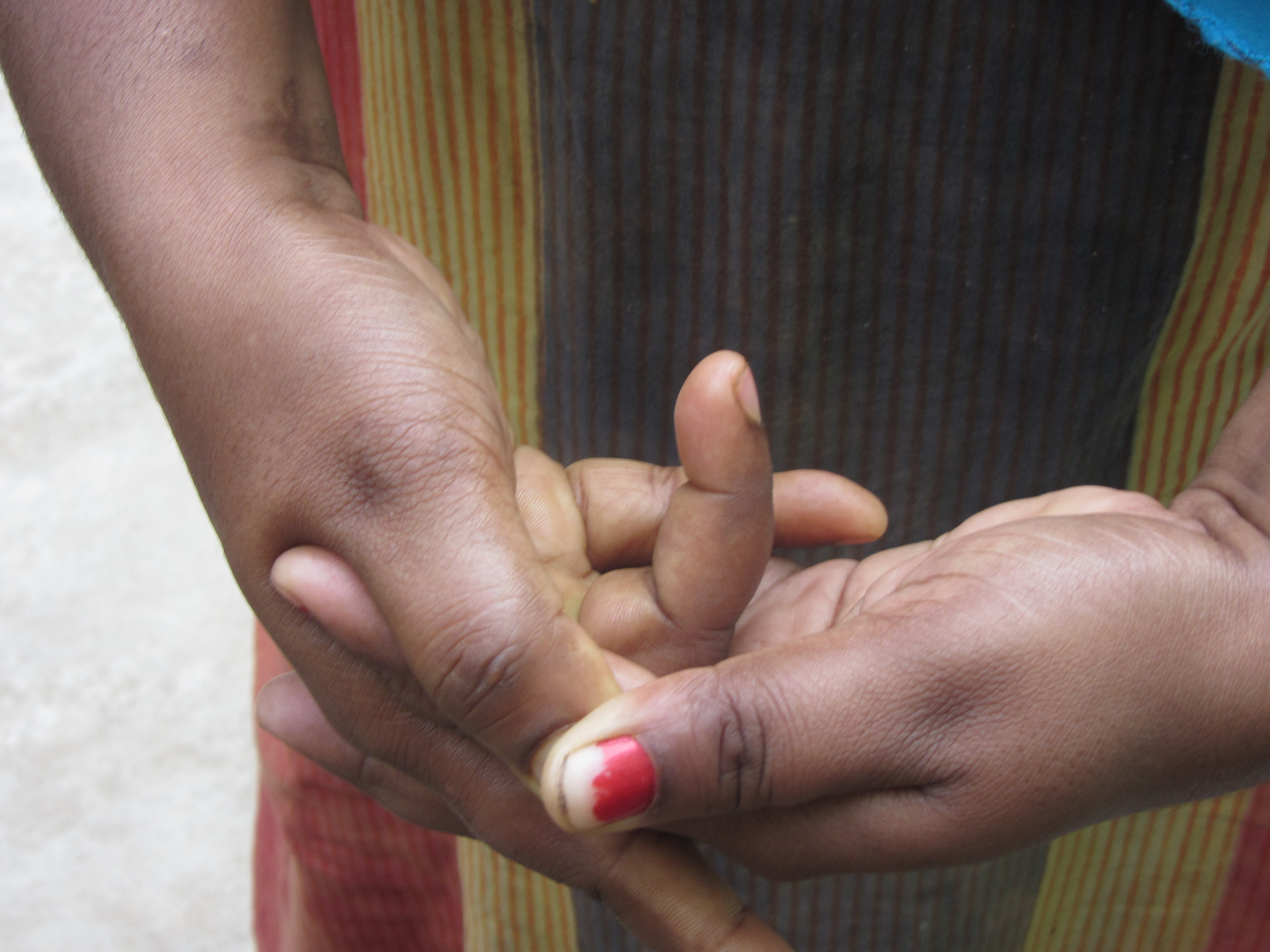 self shot - அண்மைய காலக் 'கேலி' விளையாட்டில் கை காட்டும் முறை 2